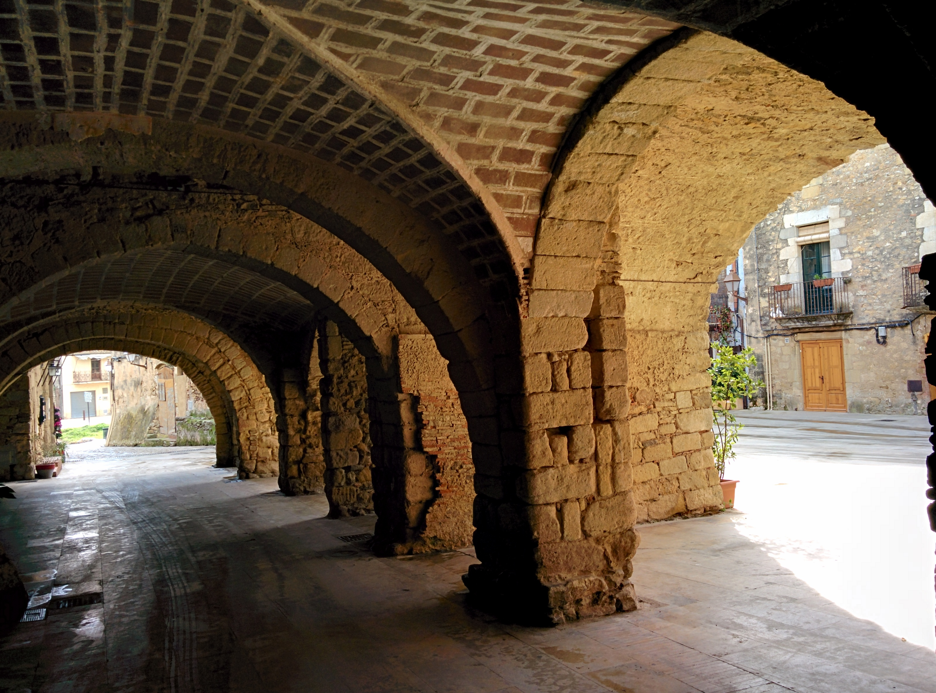 Plaça Major (Forallac)